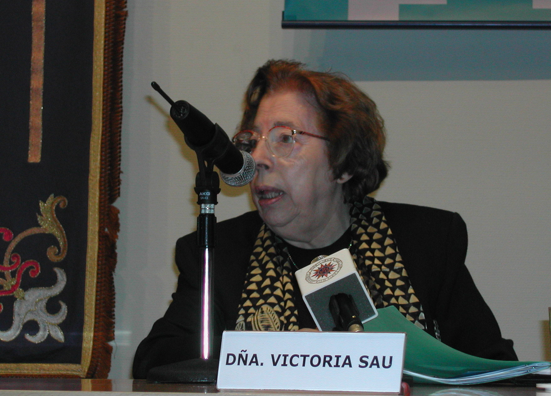 Nombre de archivo :DSCN0056.JPG Tamaño de archivo :722.7 KB (739995 Bytes) Fecha de entrega :2001/11/29 10:17:01 Tamaño de imagen :2048 x 1536 Resolución :300 x 300 ppp Número de bits :canal de 8 bits Atributo Protección :Desactivado Atributo Ocultar :Desactivado ID de la cámara :N/A Cámara :E885 Modo Calidad :NORMAL Modo Medición :Multipatrón Modo Exposición :Automático Programado Speed Light :Sí Distancia Focal :24 mm Velocidad del disparador :1/60.1segundo Abertura :F4.9 Compensación de exposición :0 EV Balance del blanco fijo :Automático Objetivo :Incorporado Modo de sincronización del flash :Cortina Delantera Diferencia de exposición :N/A Programa Flexible :N/A Sensibilidad :Auto Nitidez :Automático Tipo de imagen :Color Modo de color :N/A Ajuste de tonos :N/A Control de saturación :Normal Compensación de tono :Normal Latitud (GPS) :N/A Longitud (GPS) :N/A Altitud (GPS) :N/A